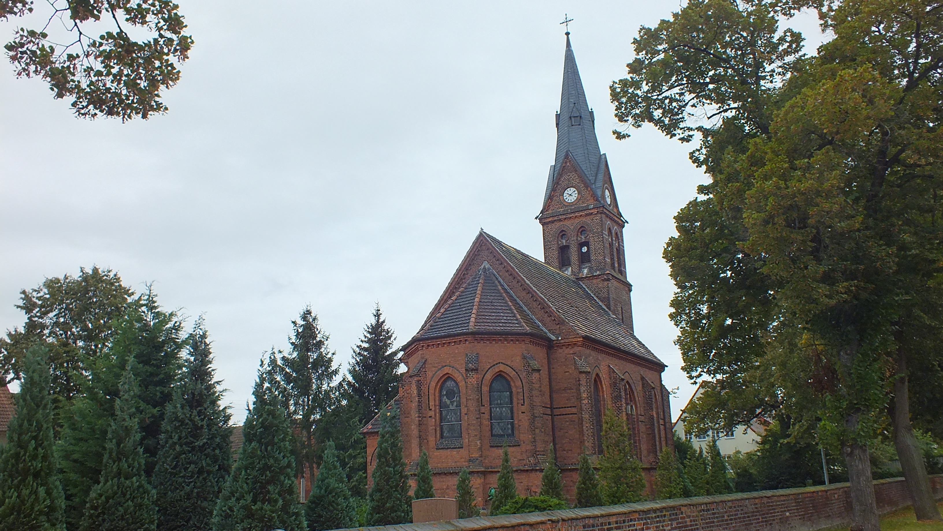 Denkmalgeschützte Kirche in Ruhlsdorf